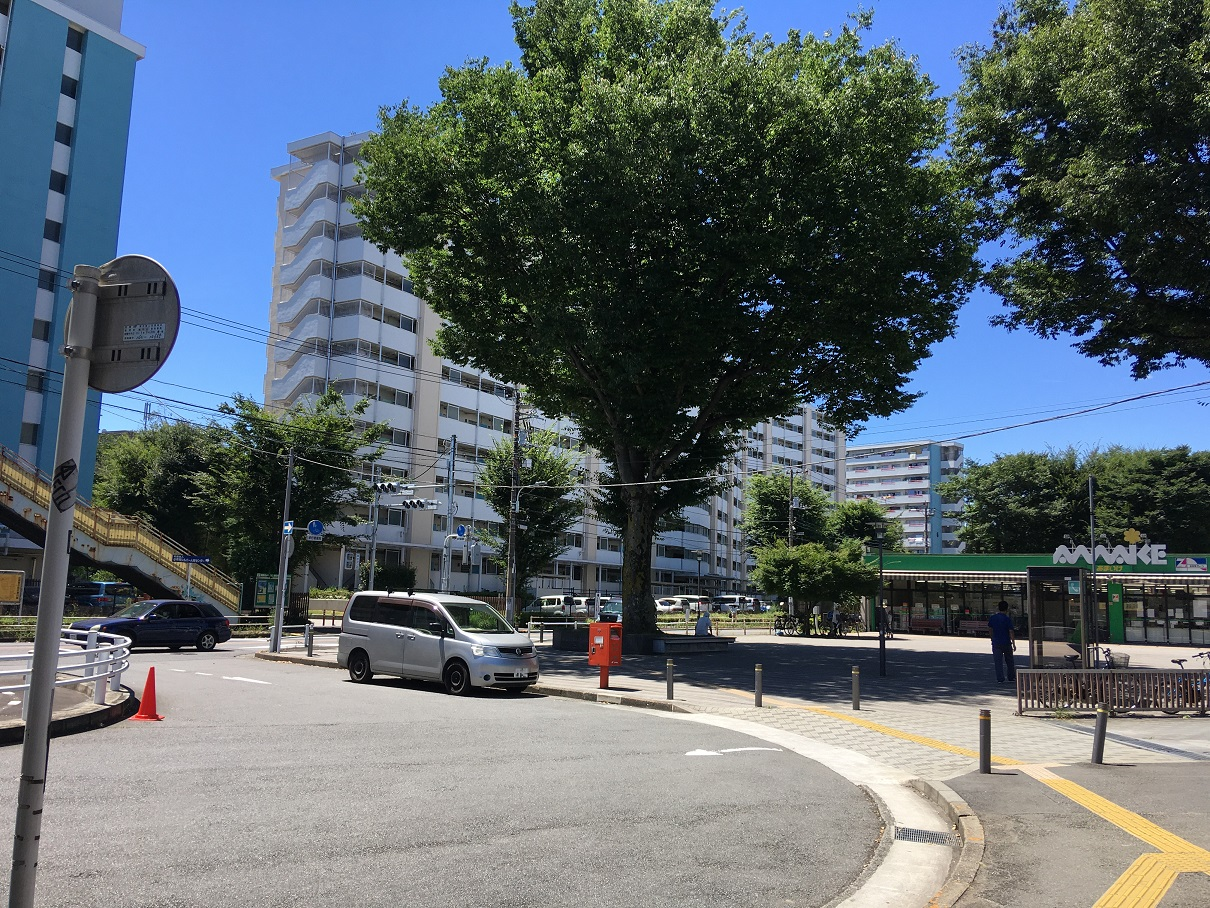 萩山駅南口ロータリー